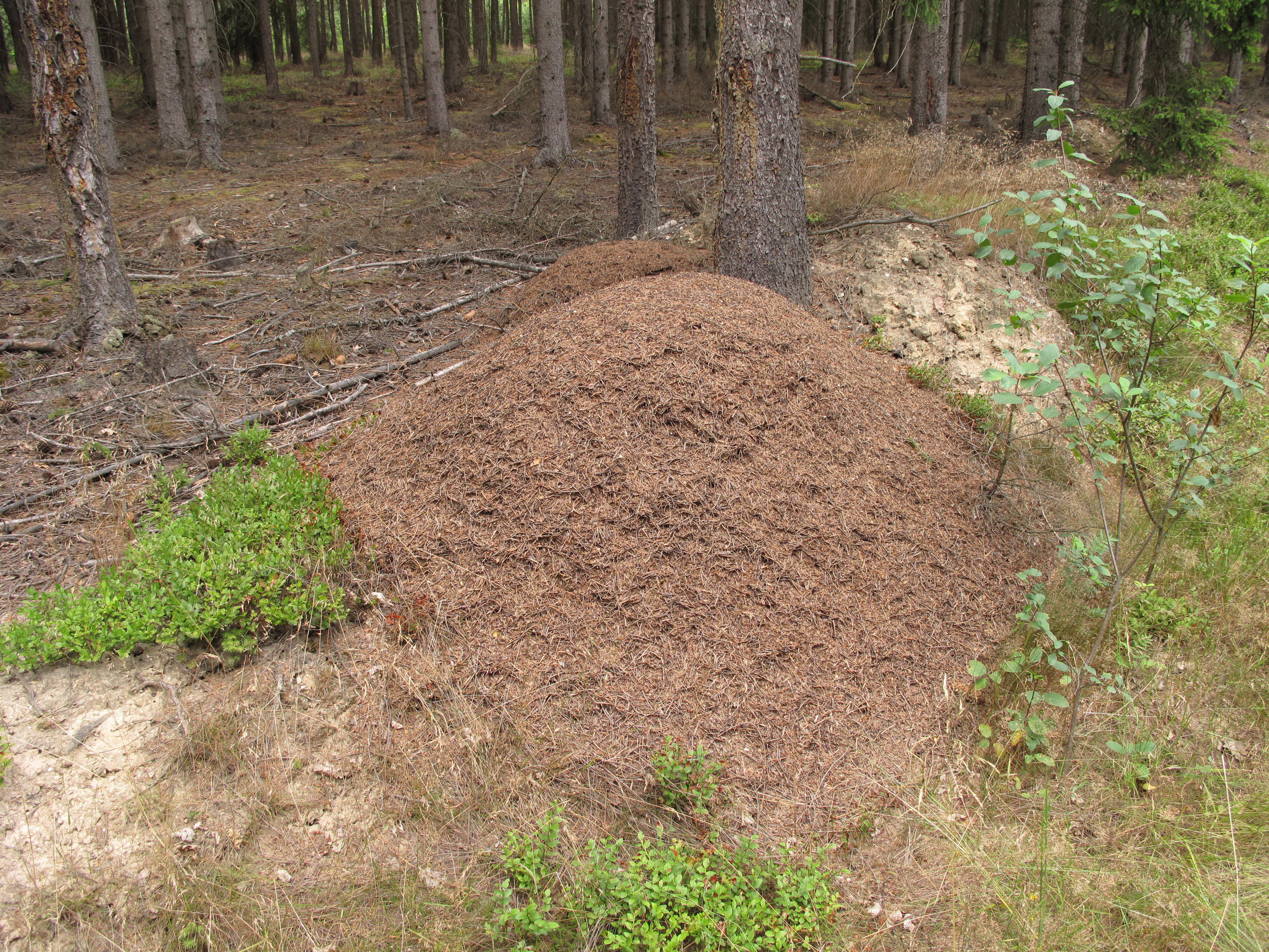 Přírodní park Manětínská. Okres Plzeň-sever, Česká republika.